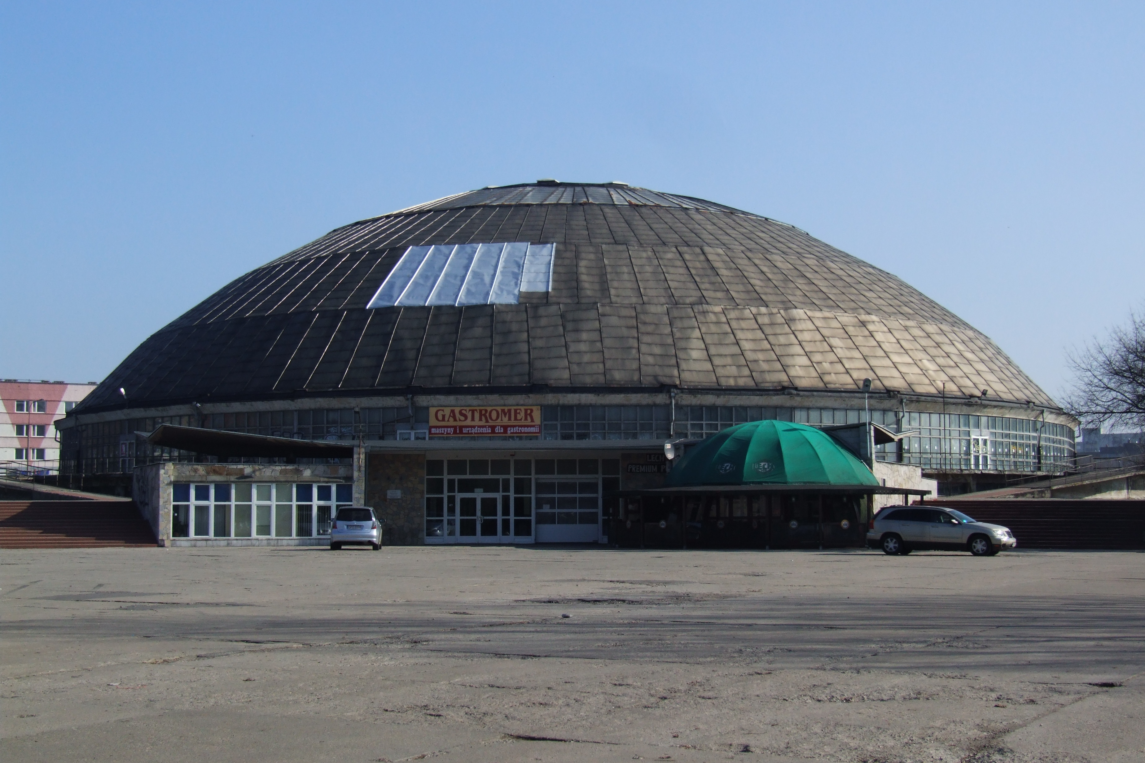 Hala Okrąglak w Opolu